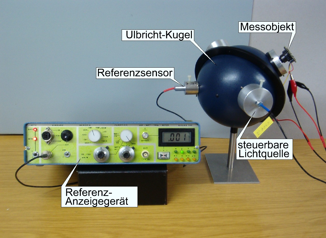 Laboraufbau Empfindlichkeits-Messung CCD-Kamera